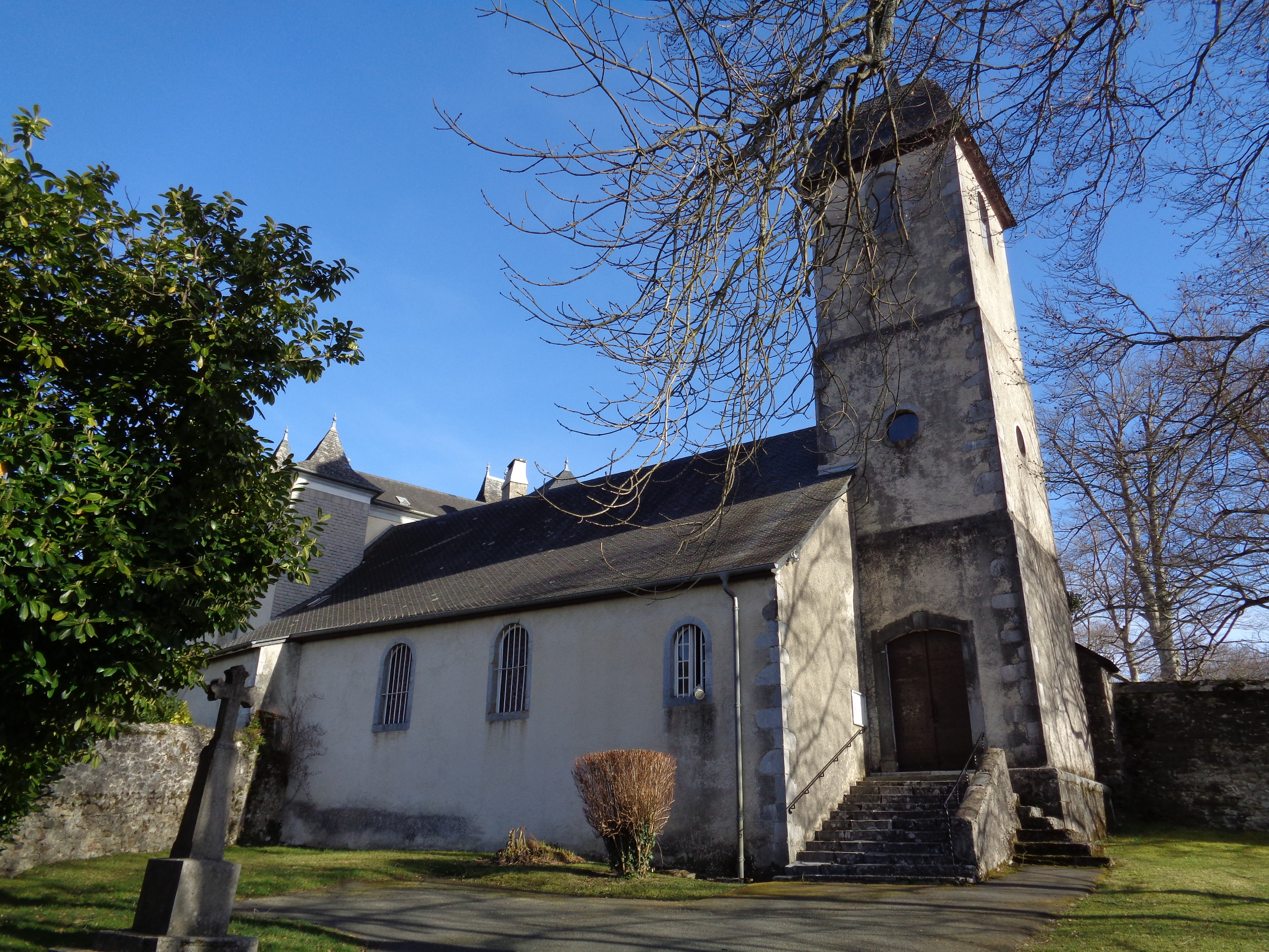 Eglise Saint-Pierre (1ère moitié du XVIIe)